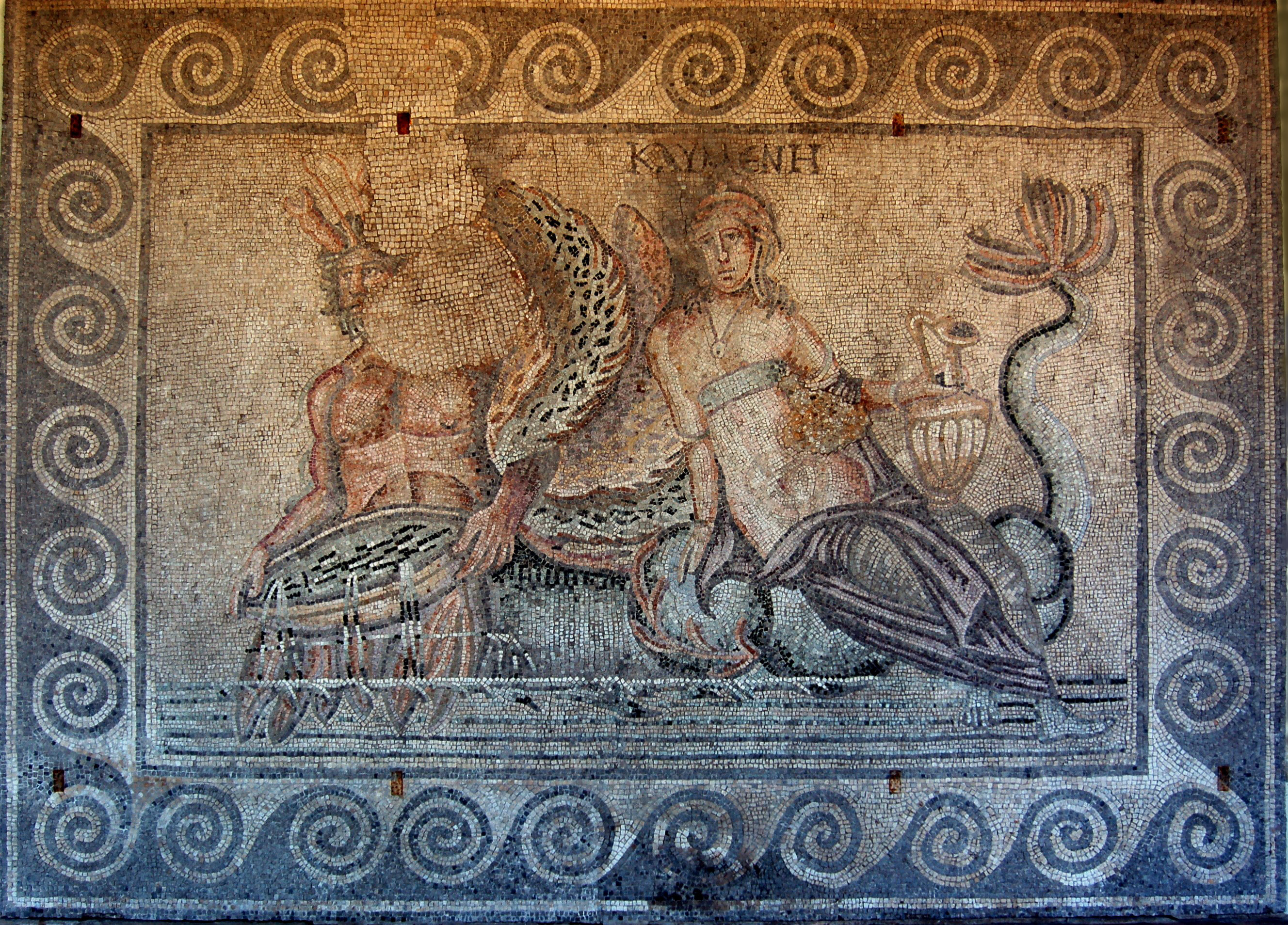 Mosaici del museo archeologico di Aquileia - Italia